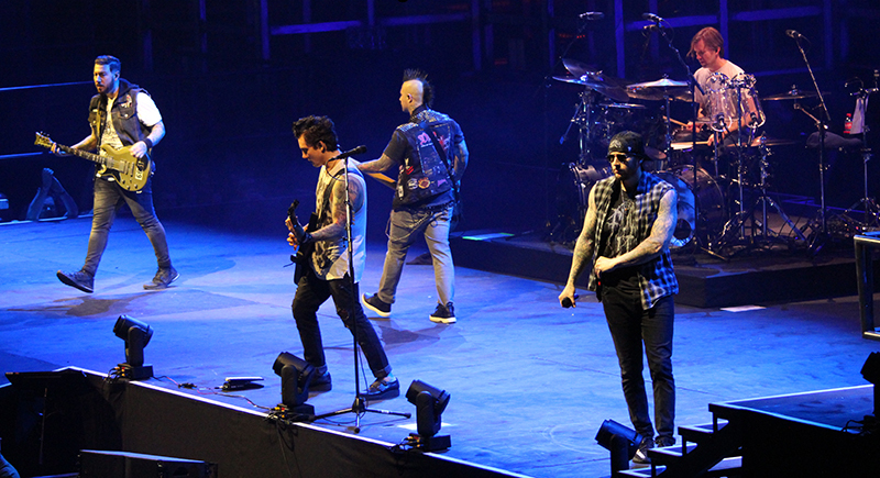 Avenged Sevenfold @ 3 Arena, Dublino. 7 gennaio 2017.